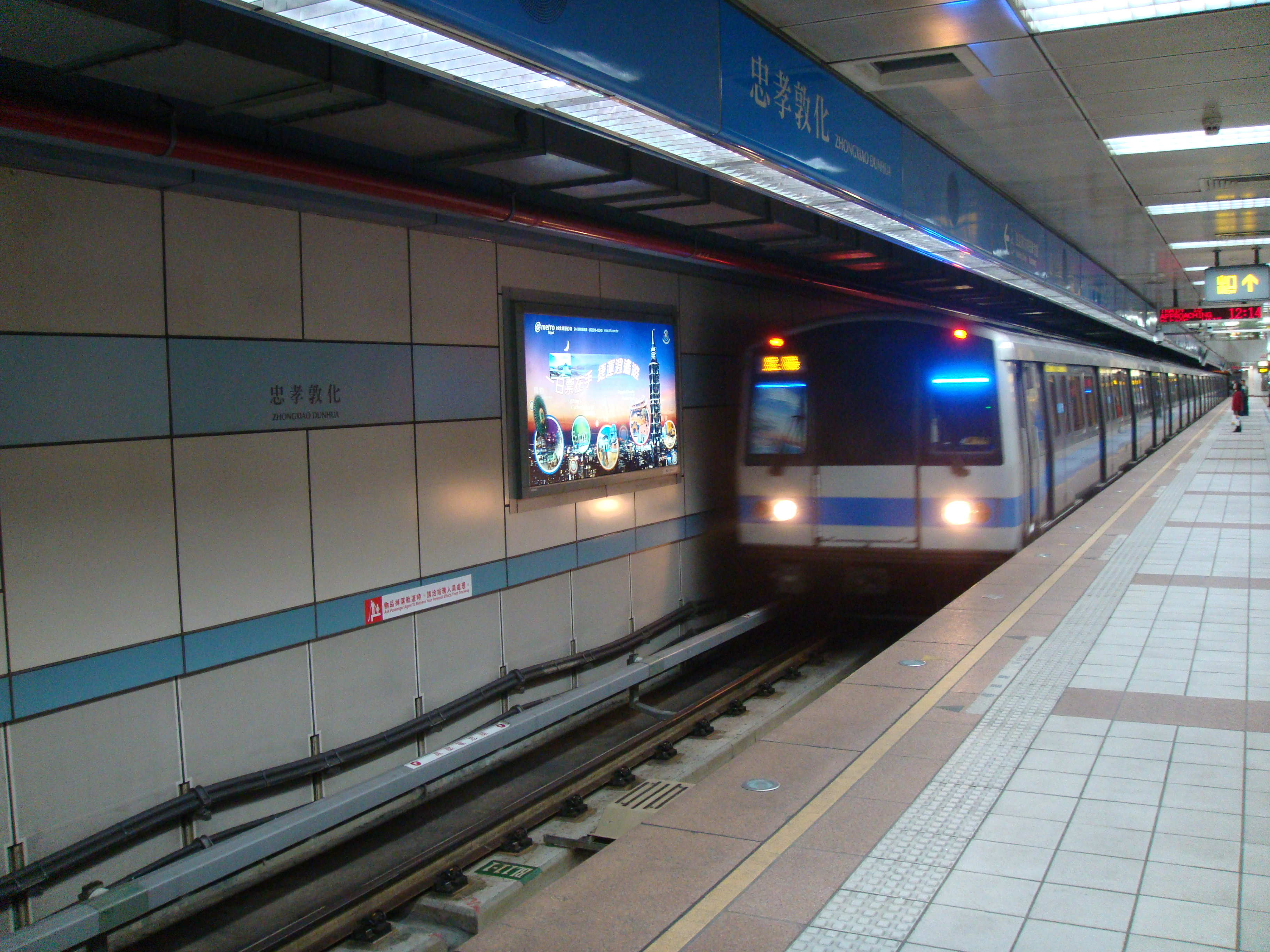 Zhongxiao Dunhua Station, Nangang Line, Taipei Metro, Taiwan.